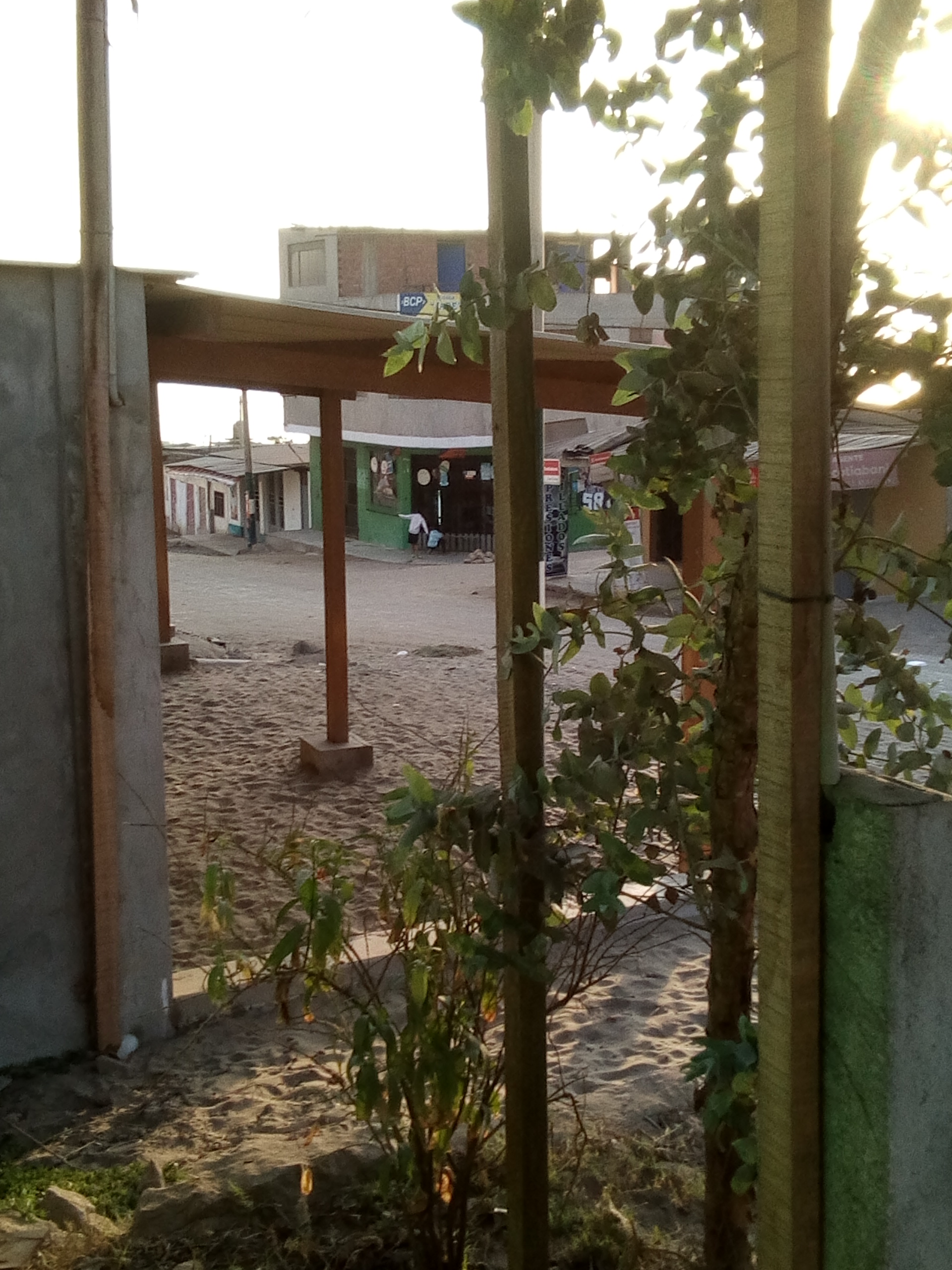 Calle en ciudad Pachacútec